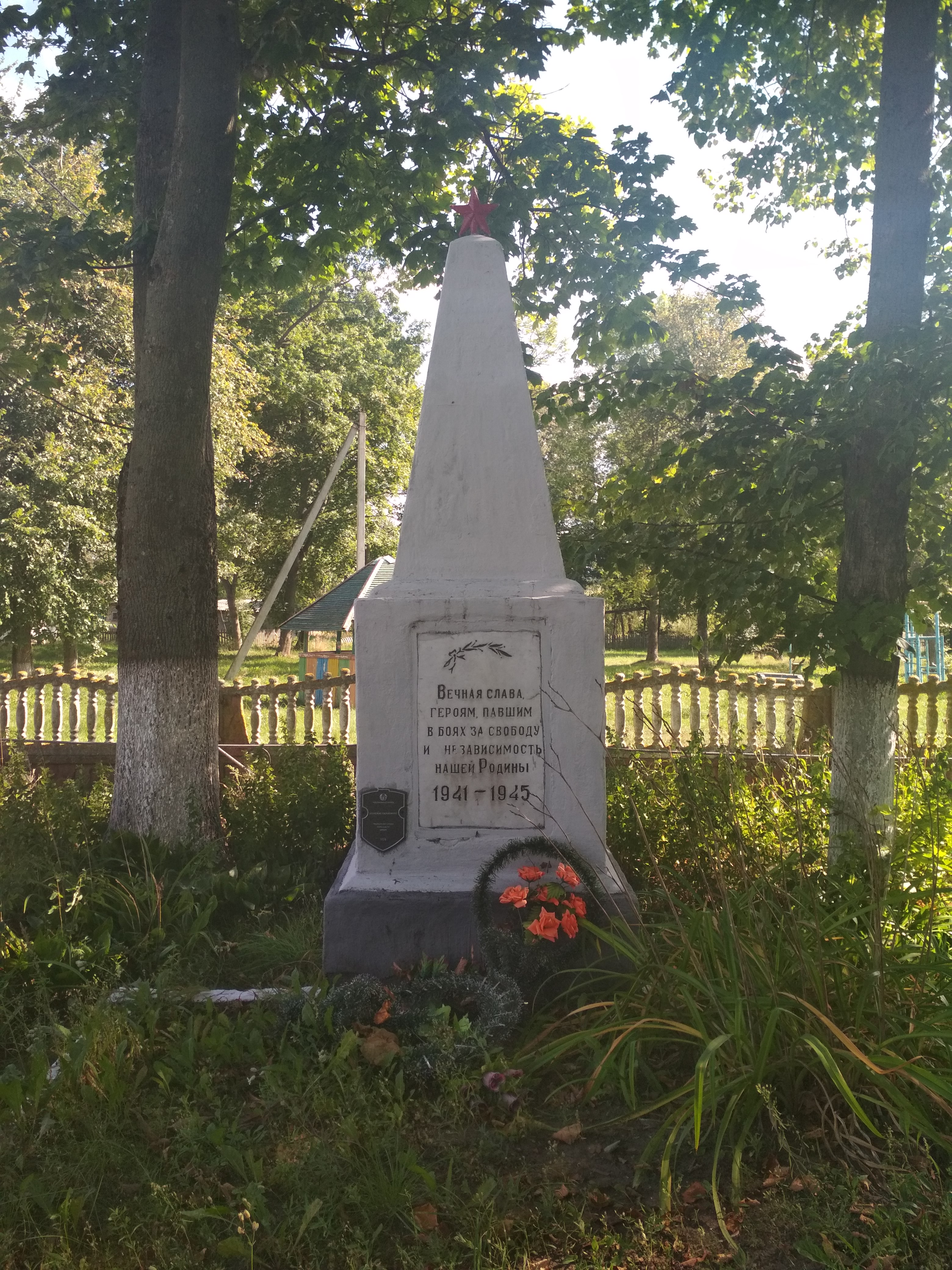 Брацкая магіла савецкіх воінаў і партызан